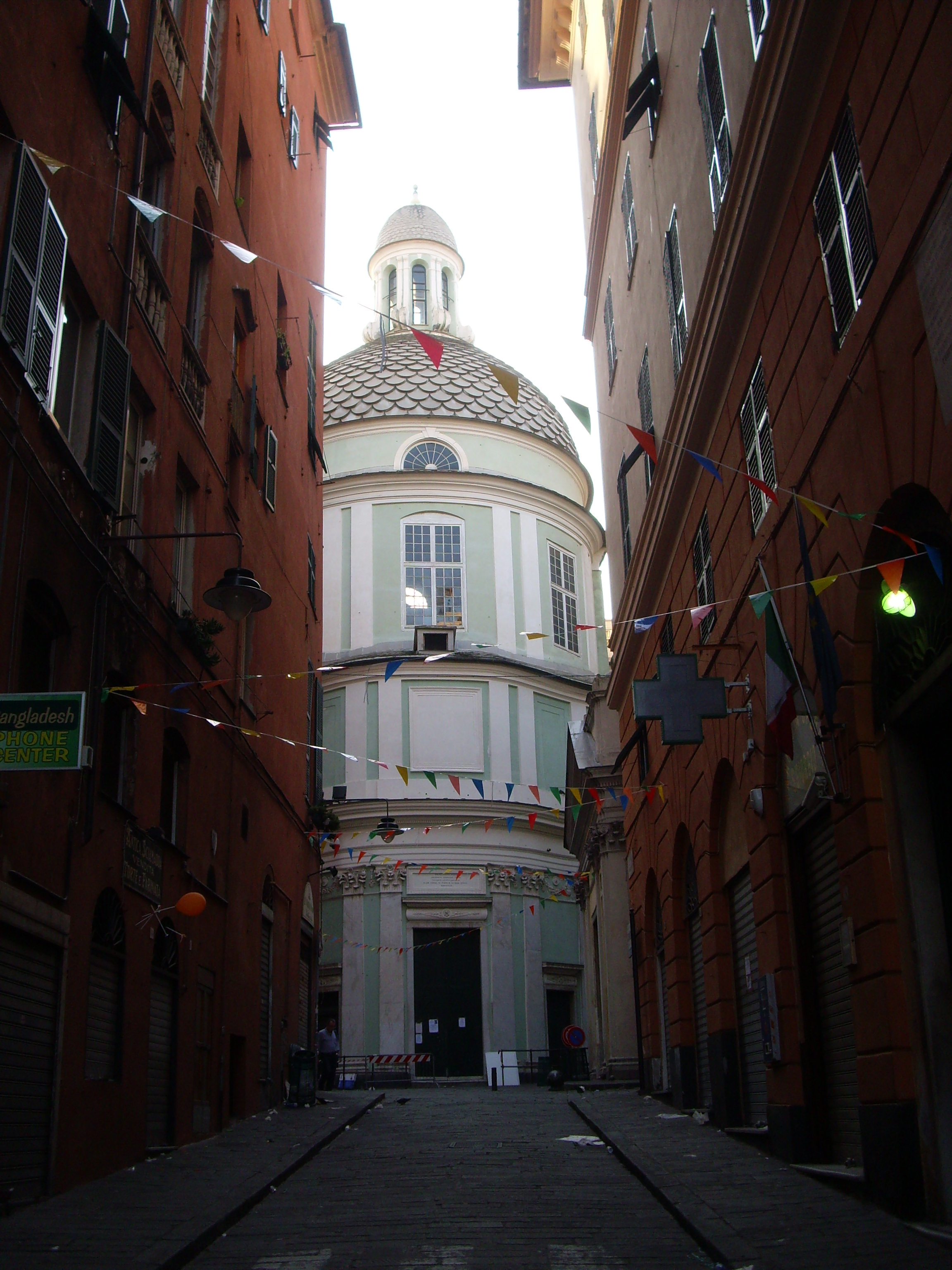 La chiesa di San Giorgio a Genova, nell'omonima piazza